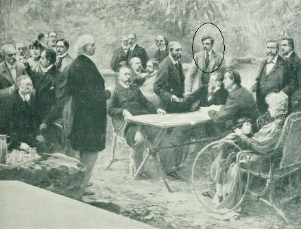 Les poètes du Parnasse Tableau de Paul Chabas, « Chez Alphonse Lemerre, à Ville d’Avray », Salon de 1895 Le jardin de l’ancienne propriété du père de Camille Corot, rachetée par l’éditeur parisien Alphonse Lemerre, sert ici de toile de fond au peintre Paul Chabas pour immortaliser les poètes du Parnasse. Aux côtés de Paul Bourget (cercle), on remarque François Coppée, Leconte de Lisle, Marcel Prévost, Auguste Dorchain, Léon Dierx, Henri Cazalis, Alphonse Daudet, Sully-Prudhomme, Jules Breton, Paul Arène, André Theuriet, Jules Claretie, José-Maria de Heredia, Paul Hervieu, Henry Roujon, Georges Lafenestre, Alphonse Lemerre.